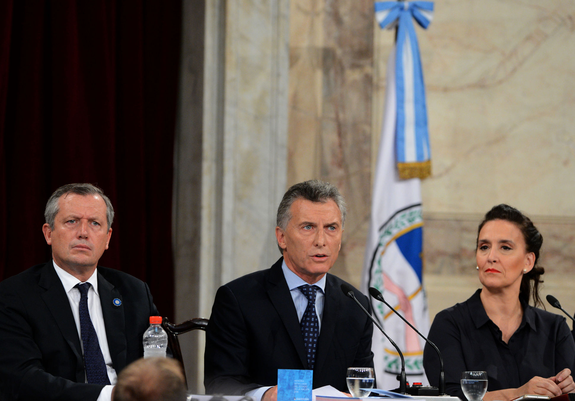 El Presidente expuso el mensaje de apertura de las sesiones ordinarias del Congreso ante la Asamblea Legislativa.